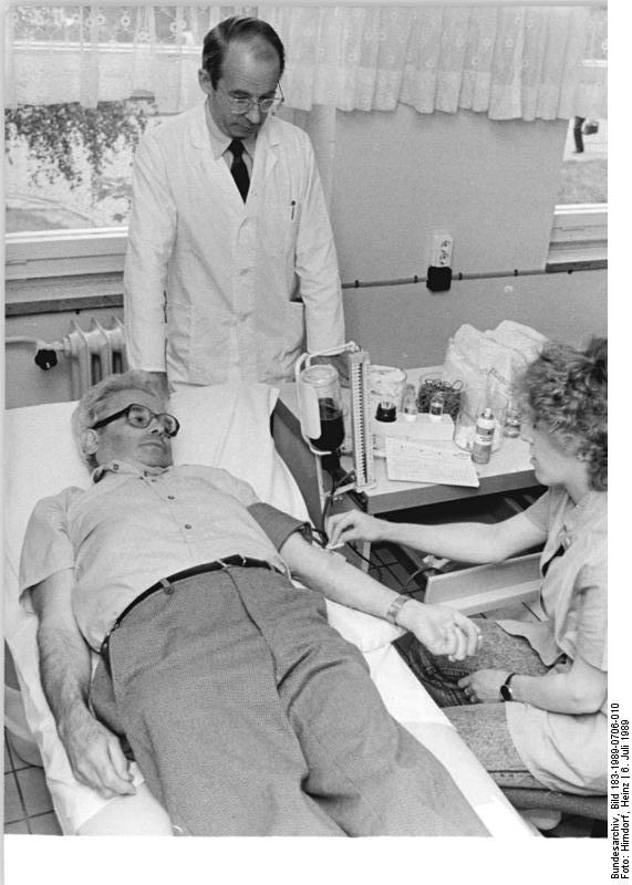 Erfurt, Bezirksinstitut für Blutspende- und Transfusionswesen ADN-ZB Hirndorf 6.7.89 Bez. Erfurt: DDR-Zeugnisse- Der 62jährige Horst Rebhahn, Gruppenleiter für Materialwirtschaft, hat in den vergangenen 25 Jahren bereits rund 60 Liter Blut gesprendet. Dr. Rudolf Uhlig und Schwester Ute vom Bezirksinstitut für Blutspende- und Transfusionswesen Erfurt kontrollieren die Blutabnahme. Der "Saft des Lebens" ist in der DDR unbezahlbar und wird nicht gehandelt. Jährlich stehen dennoch weit über 700.000 Spenden, das sind Tag für Tag rund 2.000, zur Verfügung. Rot-Kreuz-Blutspenden werden unentgeltlich gegeben. Alle werden sofort im Labor untersucht, auch auf etwaige Aids-Viren. - siehe auch 1989-0706-9 und 11N - Achtung! Sie erhalten hierzu eine ADN-Meldung.